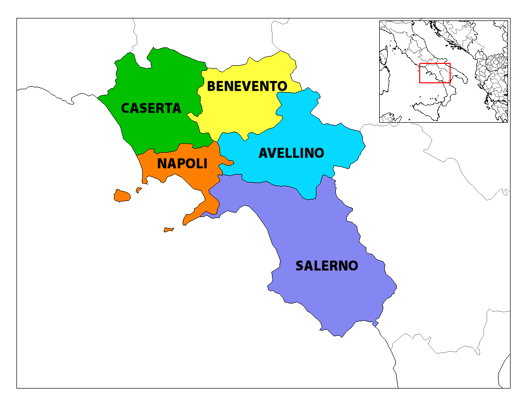 Province della Campania in italiano